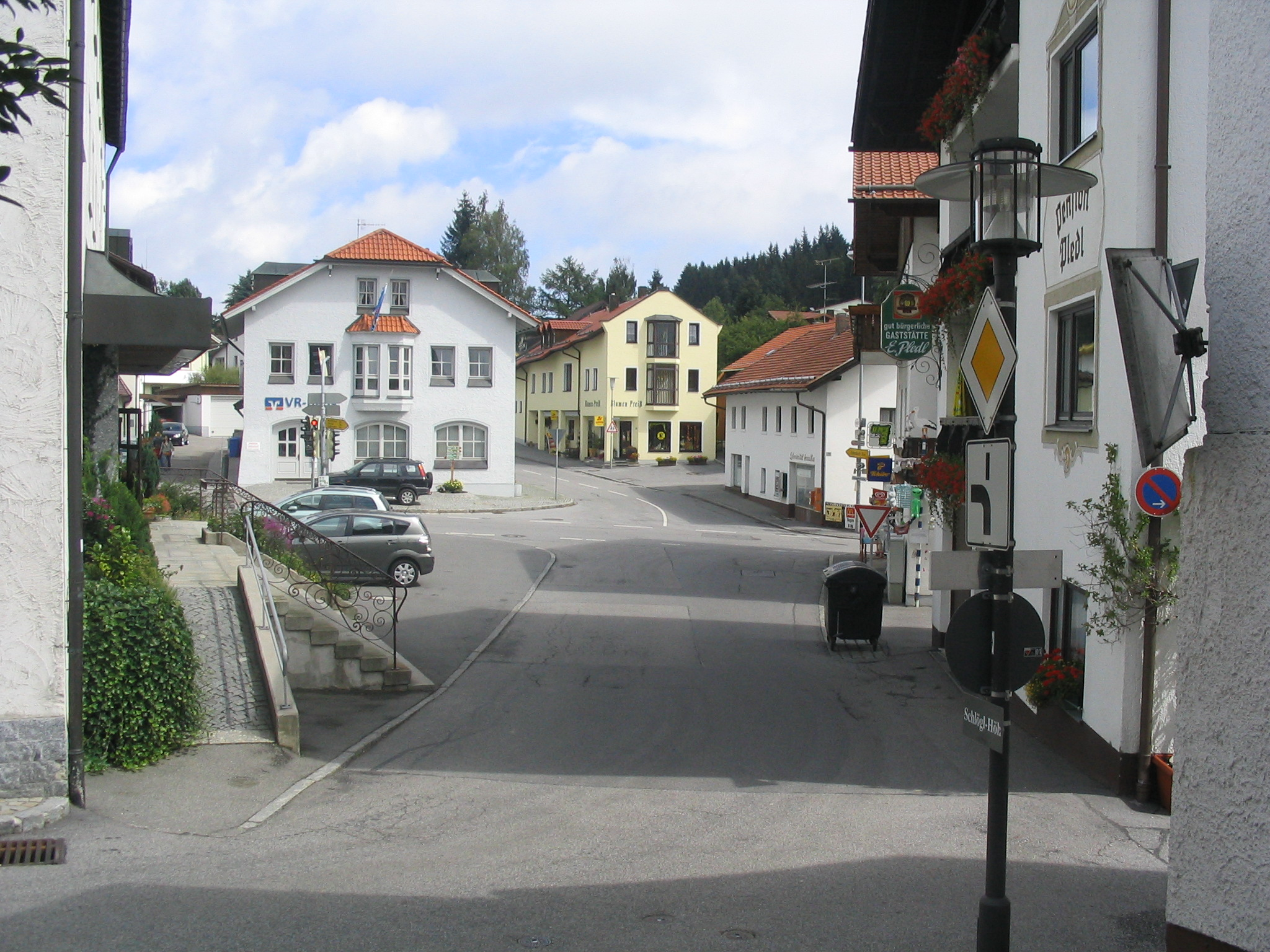 Bischofsmais, Straßenkrezung in Ortsmitte, aufgenommen am 24.07.2007 von Dr. Hagen Graebner